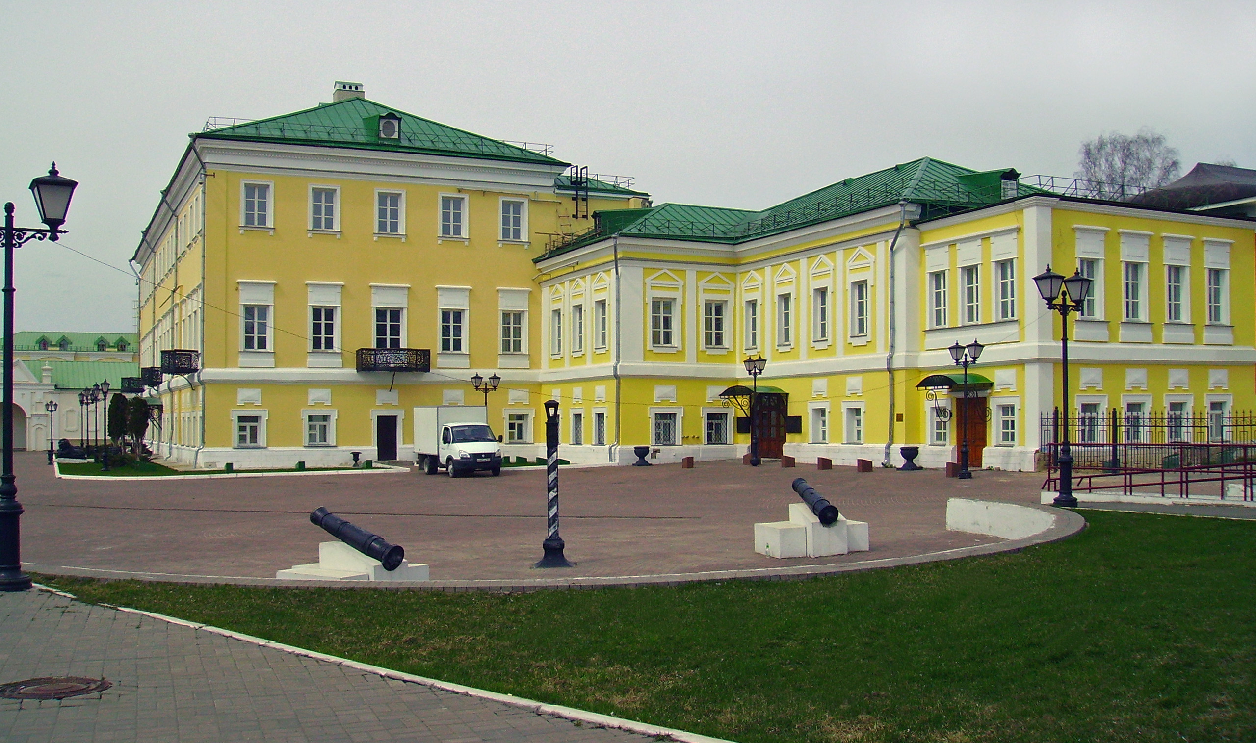 Выкса. Восточное крыло музея истории Металлургического завода